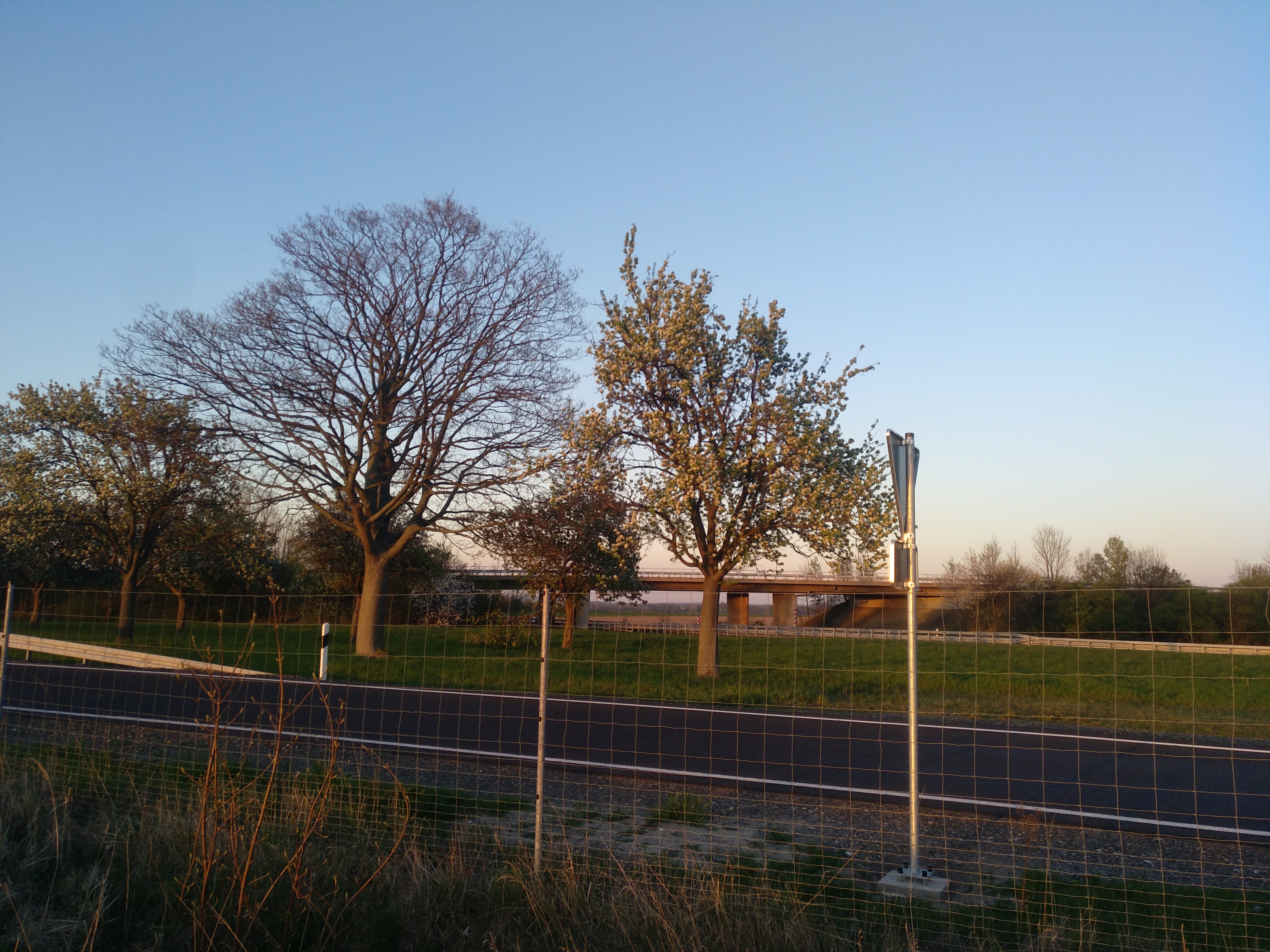 Blick auf die Abfahrtsbrücke der AS Vienenburg-Süd an der BAB 369 und den Alleenbestand der alten Streckenführung der Bundesstraße 6